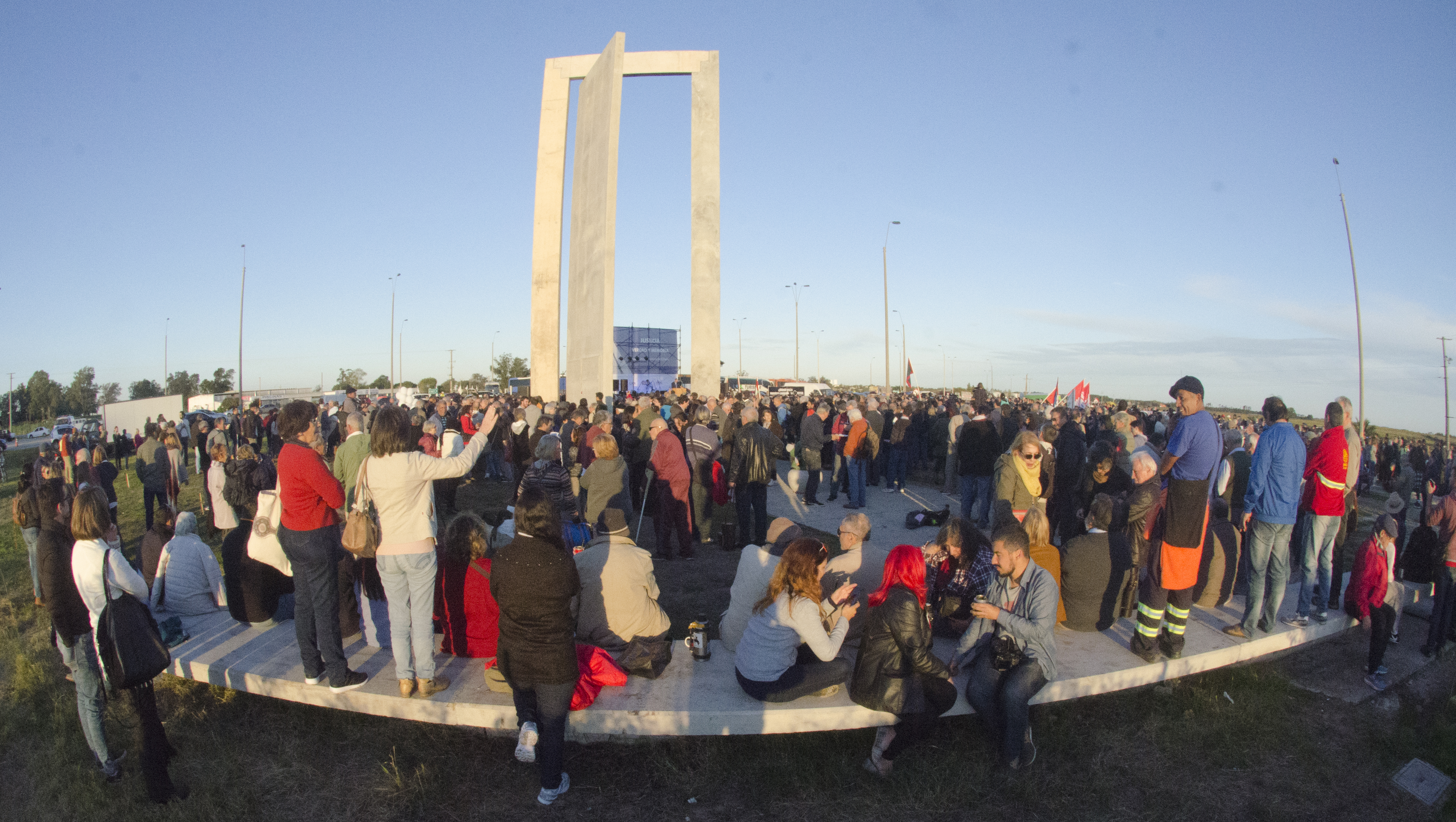 Memorial sobre el Penal de Libertad